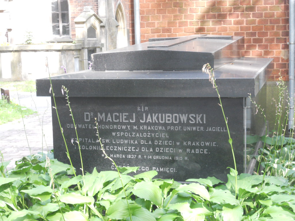 Grobowiec Macieja Jakubowskiego na Cmentarzu Rakowickim w Krakowie.